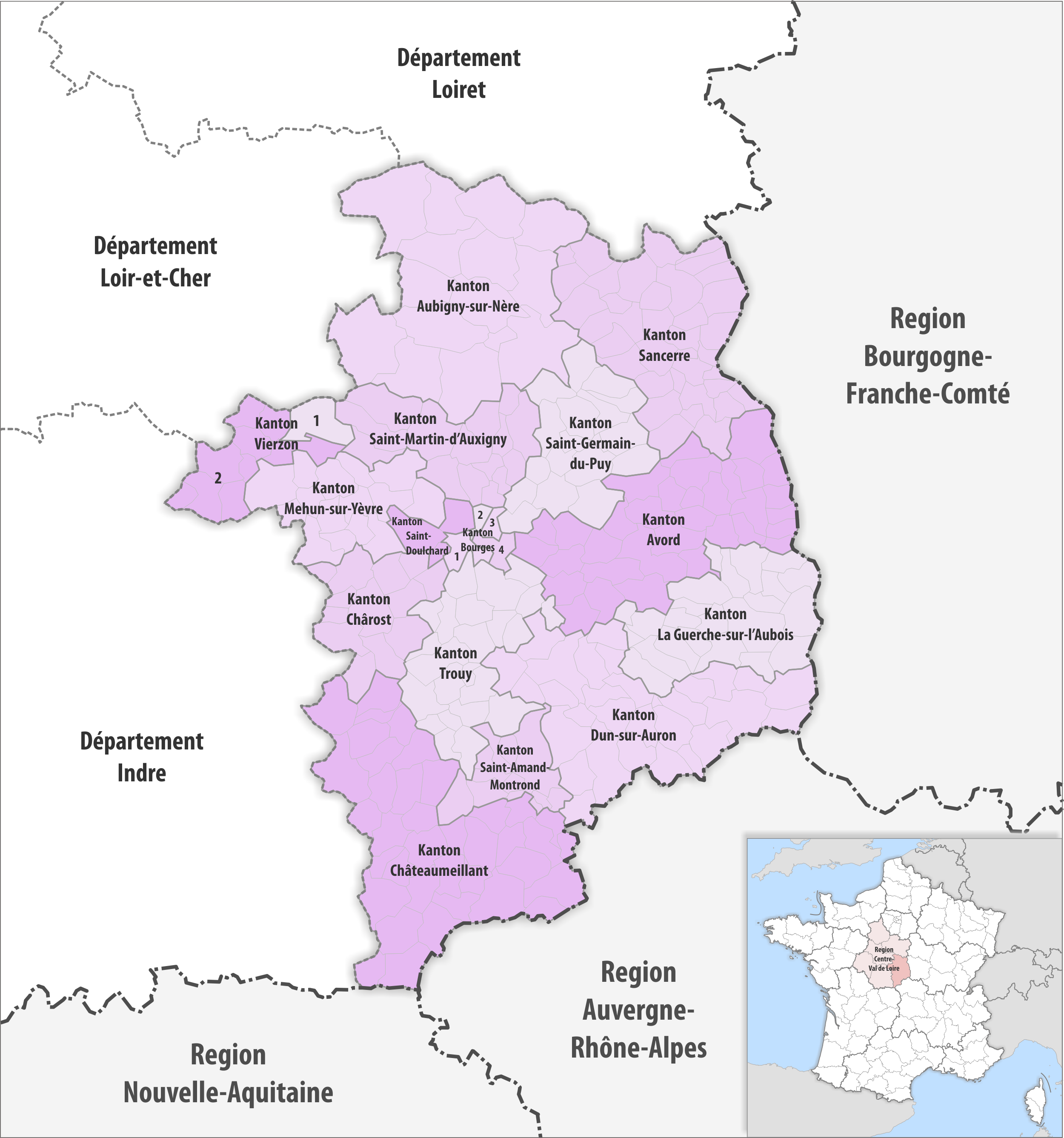 Gemeinden und Kantone im Departement Cher